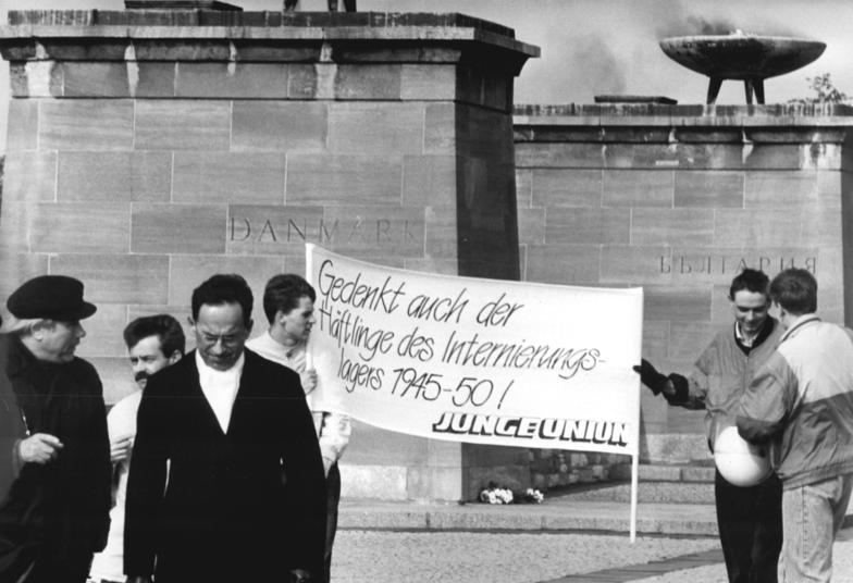 Weimar, Demonstration, Gedenkveranstaltung für Buchenwald ADN-Jürgen Ludwig 7.4.90-Bez. Erfurt: Am 45. Jahrestag der Selbstbefreiung des KZ Buchenwald machten Vertreter der Jungen Union Weimar auch auf die Greuel des sowjetischen Sicherheitsdienstes NKWD aufmerksam, der auf dem Territorium des ehemaligen KZ das "Speziallager 2" unterhielt.